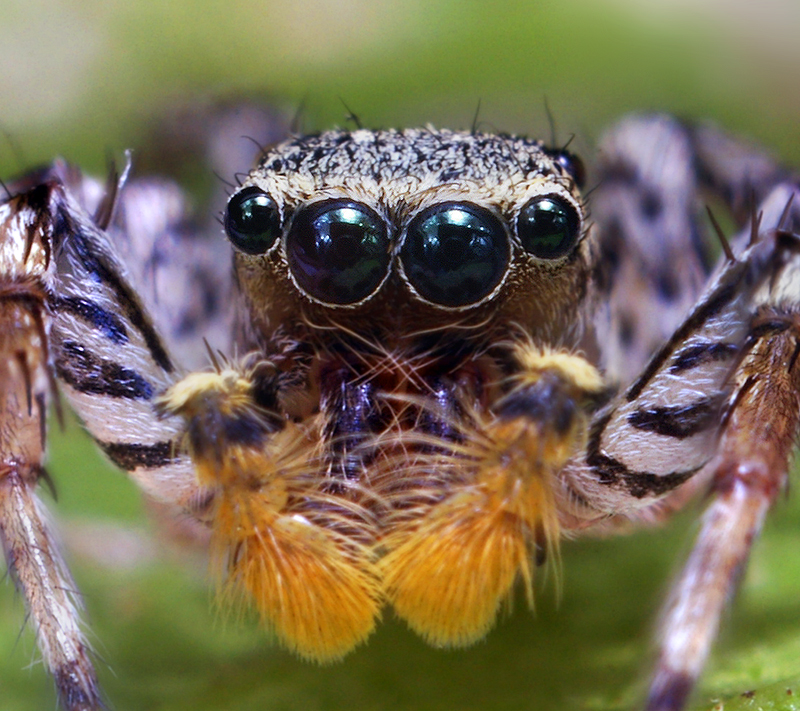 male Maevia inclemens